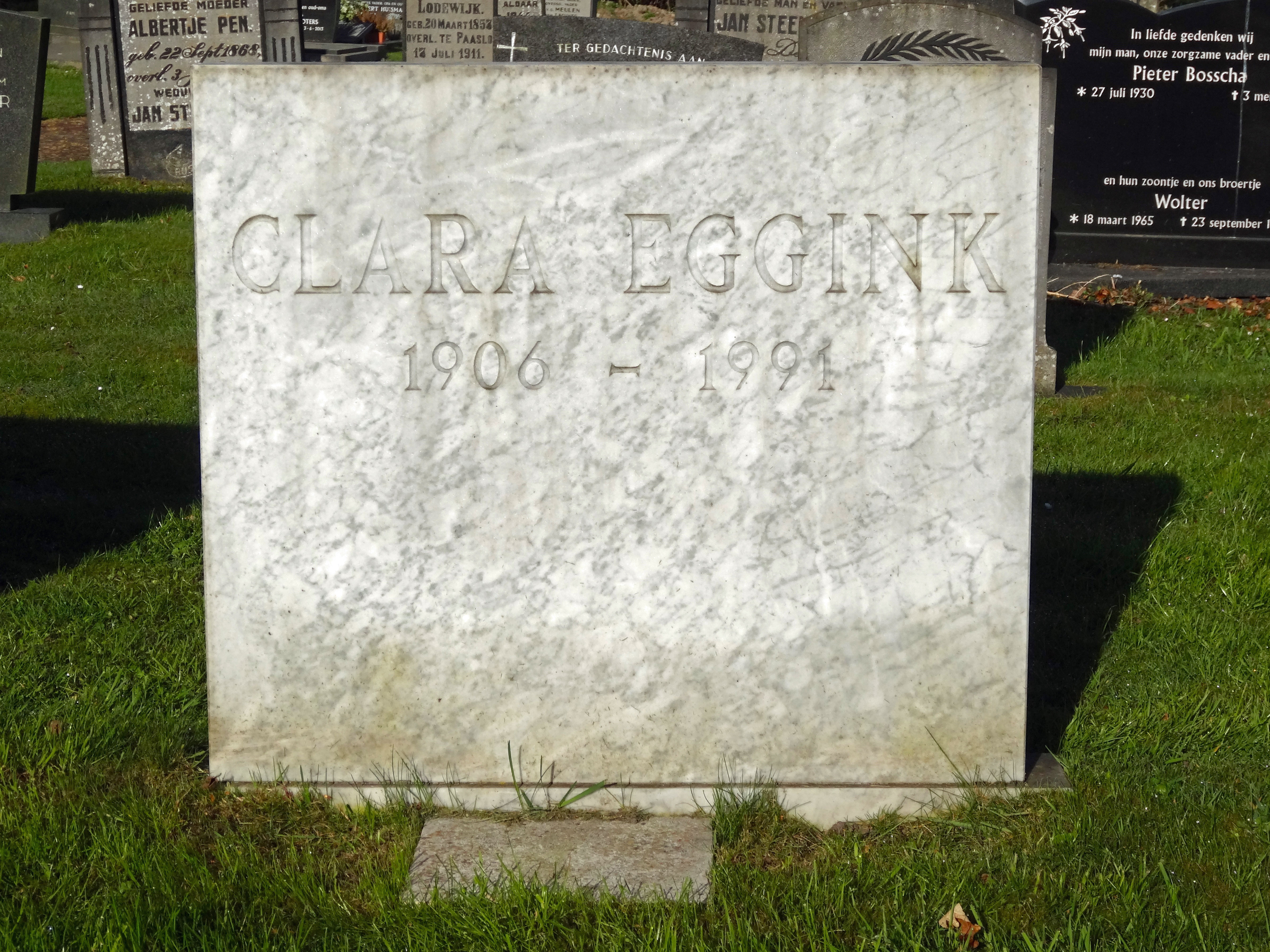 Grafzerk van Clara Eggink op het kerkhof nabij de kerk van Paasloo